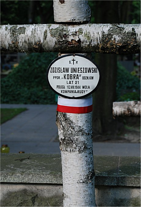 Mogiła na Powązkach Wojskowych w Warszawie